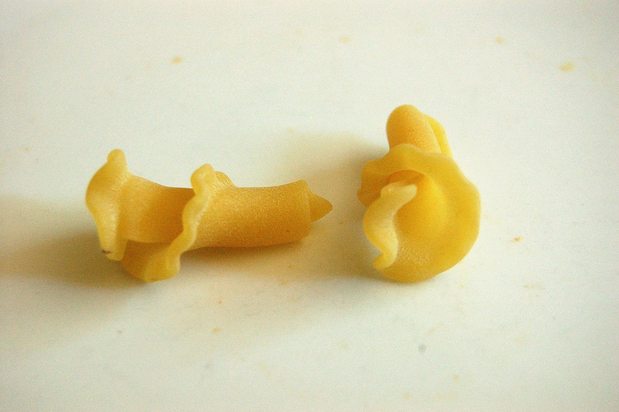 Campanelle pasta close up.